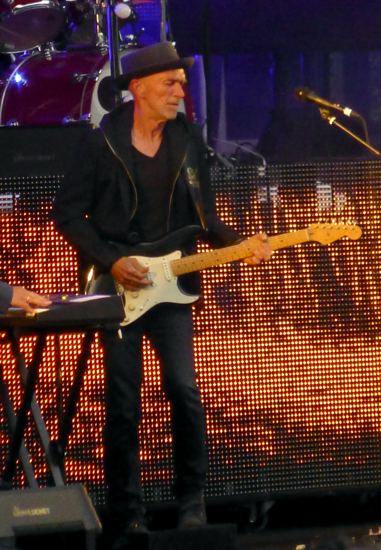 Per Chr Frost med Gnags til turnestart i Friheden Aarhus 22 maj 2015